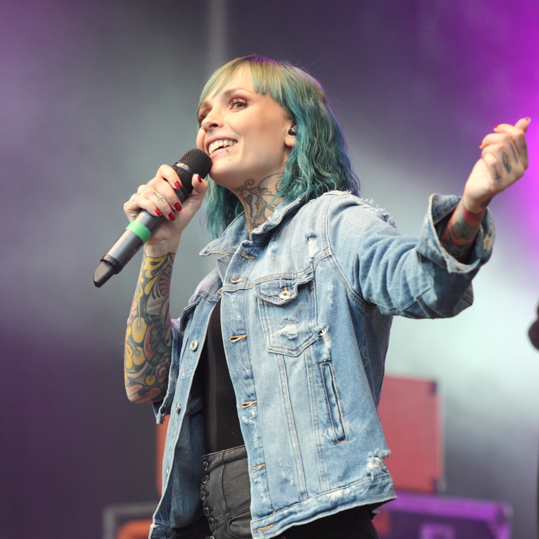 die deutsche Sängerin Eule (aka Jazzy Gudd) live bei Essen Original am 7.9.2019